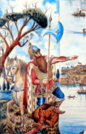 Князь Ярослав Мудрый над телом убитого медведя - иллюстрация к легенде об основании Ярославля. Фрагмент с вида ярославских набережных. Г.П. Сабанеев. 1878. Ярославль. Ярославский музей-заповедник.